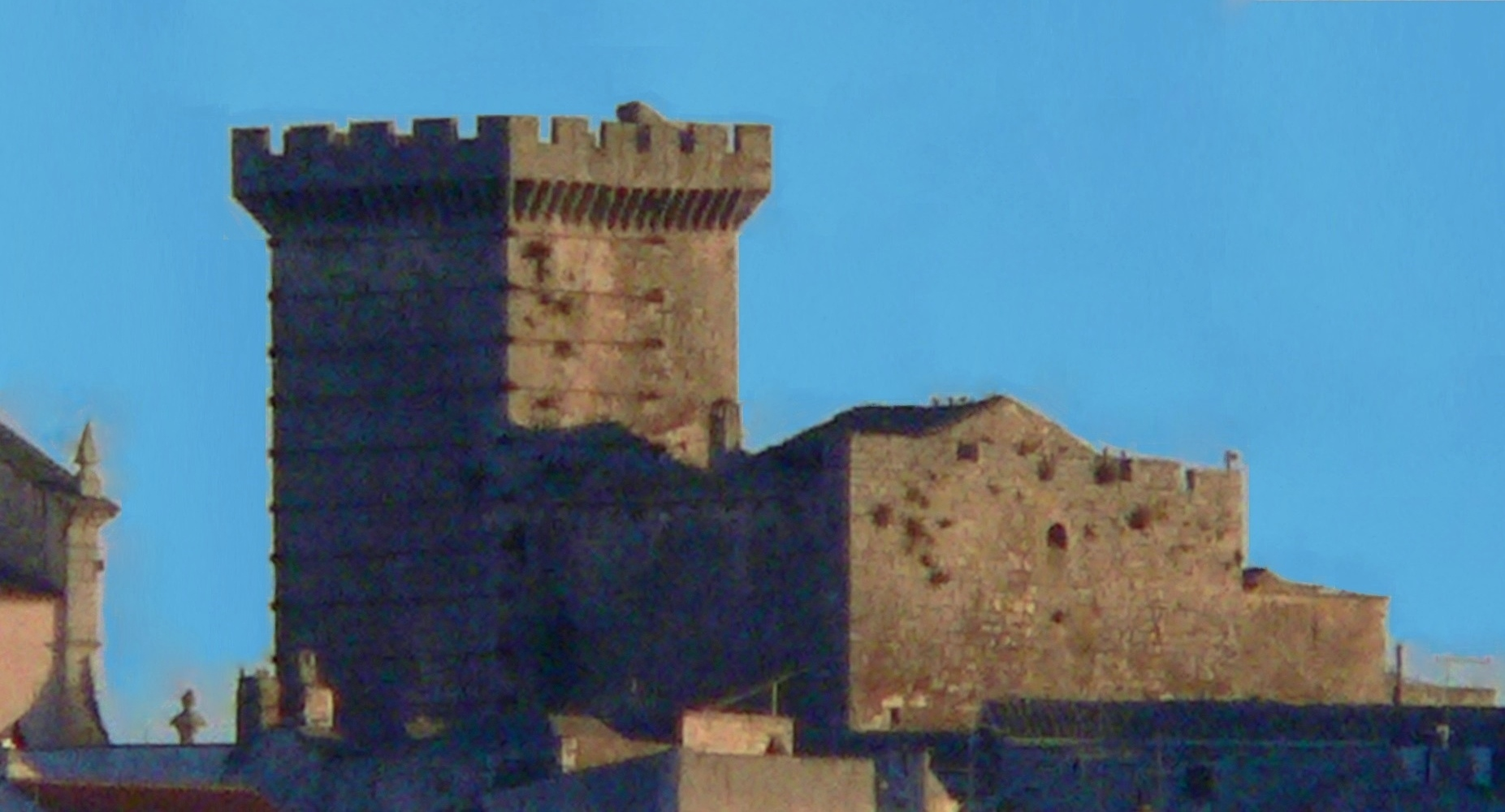 La torre quadrata (a sinistra) del castello di Ceglie e la più antica e più bassa Torre Normanna.